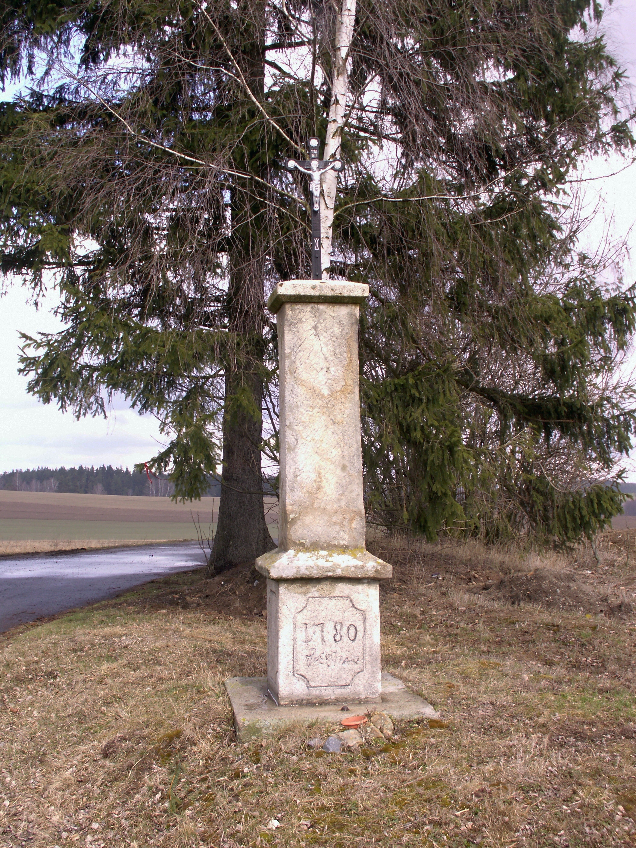 boží muka z roku 1780 (od rychtáře Fabiána Straky) jako dík za omezení roboty, odvrácení moru a ukončení hladových let, Bobrůvka, odbočka k Obecnímu rybníku, okres Žďár nad Sázavou